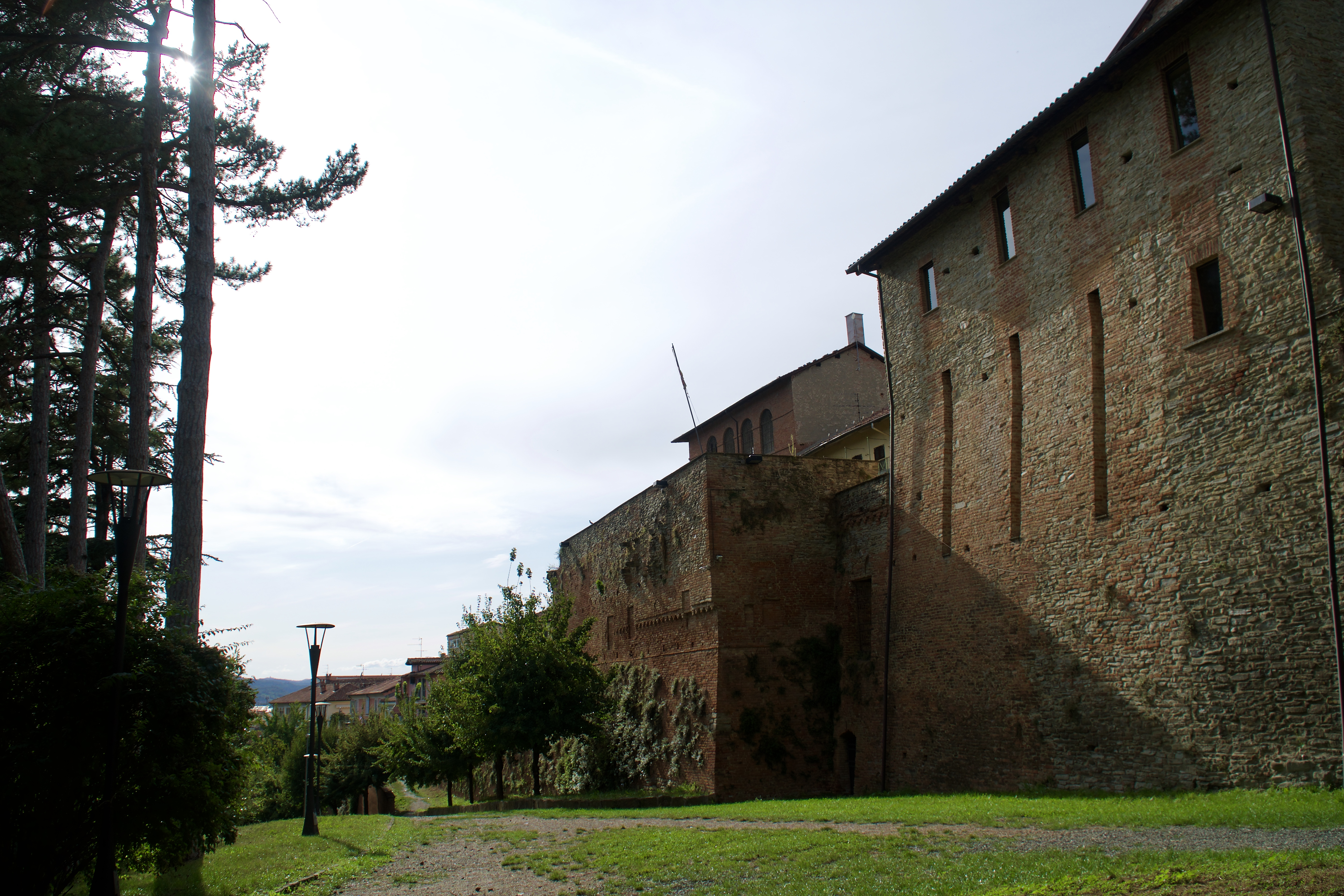 Mura del castello dei Paleologi, più parte del parco del castello. This is a photo of a monument which is part of cultural heritage of Italy.